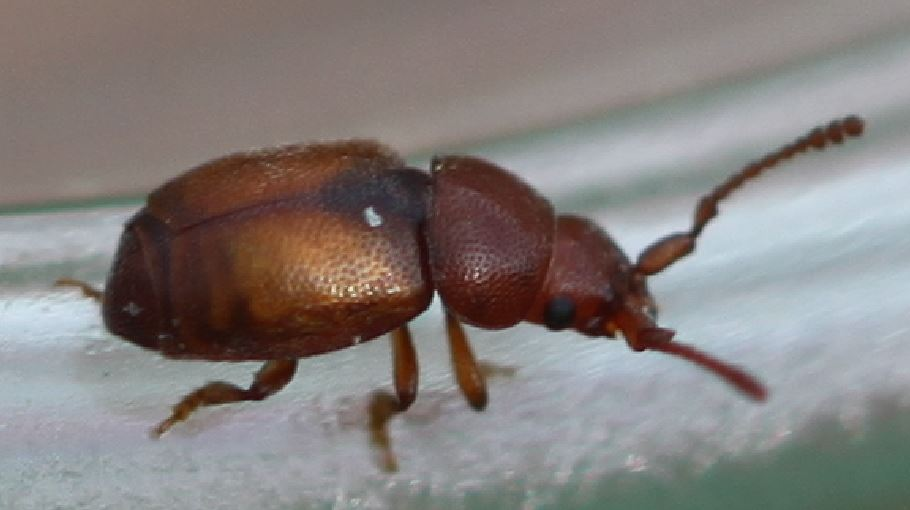 Kateretes pedicularius am 16. April 2018 in der Schwetzinger Hardt